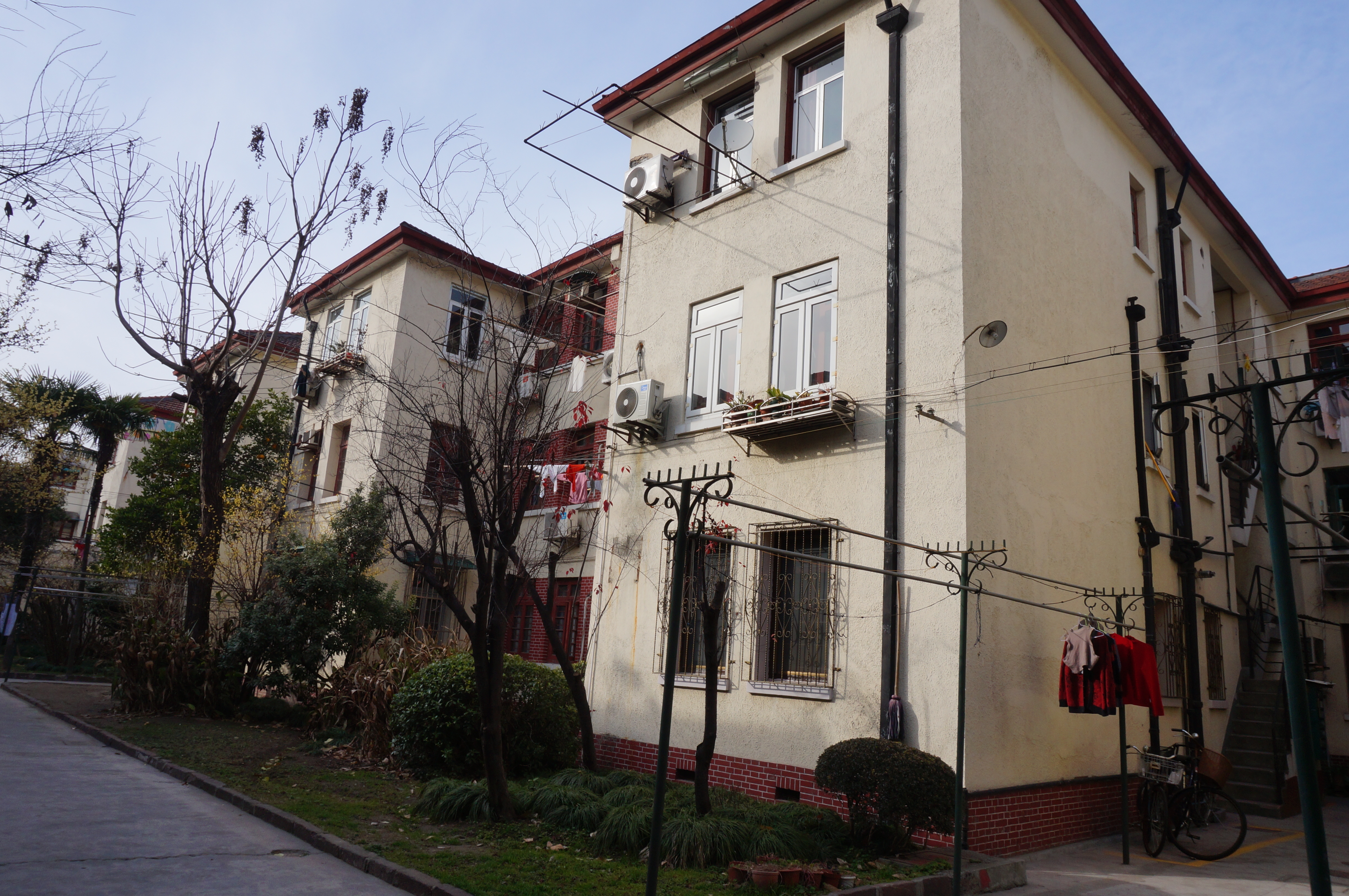 上海市第二批优秀历史建筑——上海永嘉新村